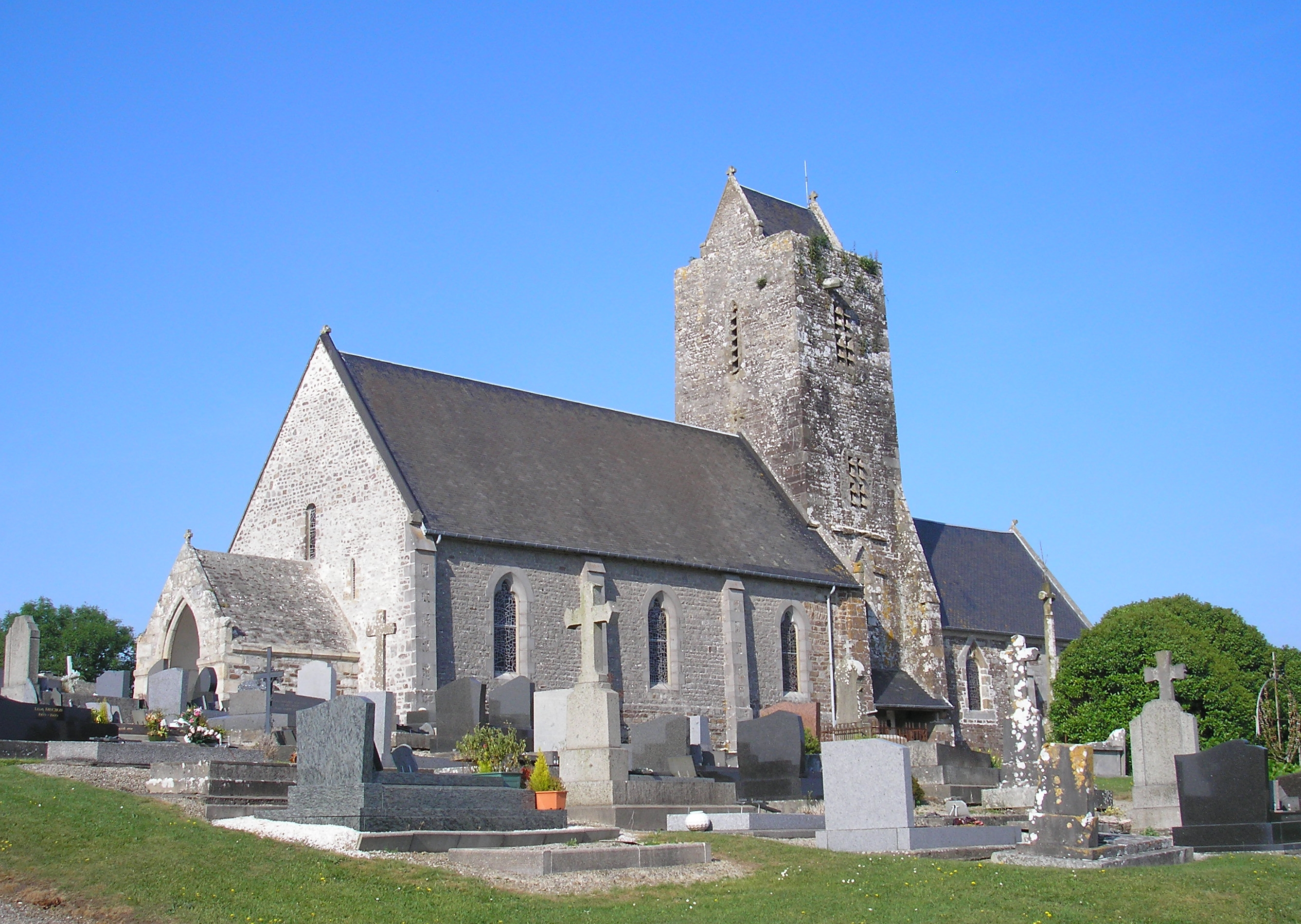 Montchaton (Normandie, France).Façade sud de l'église Saint-Georges qui présente quelques assises d'appareil en arête-de-poisson.